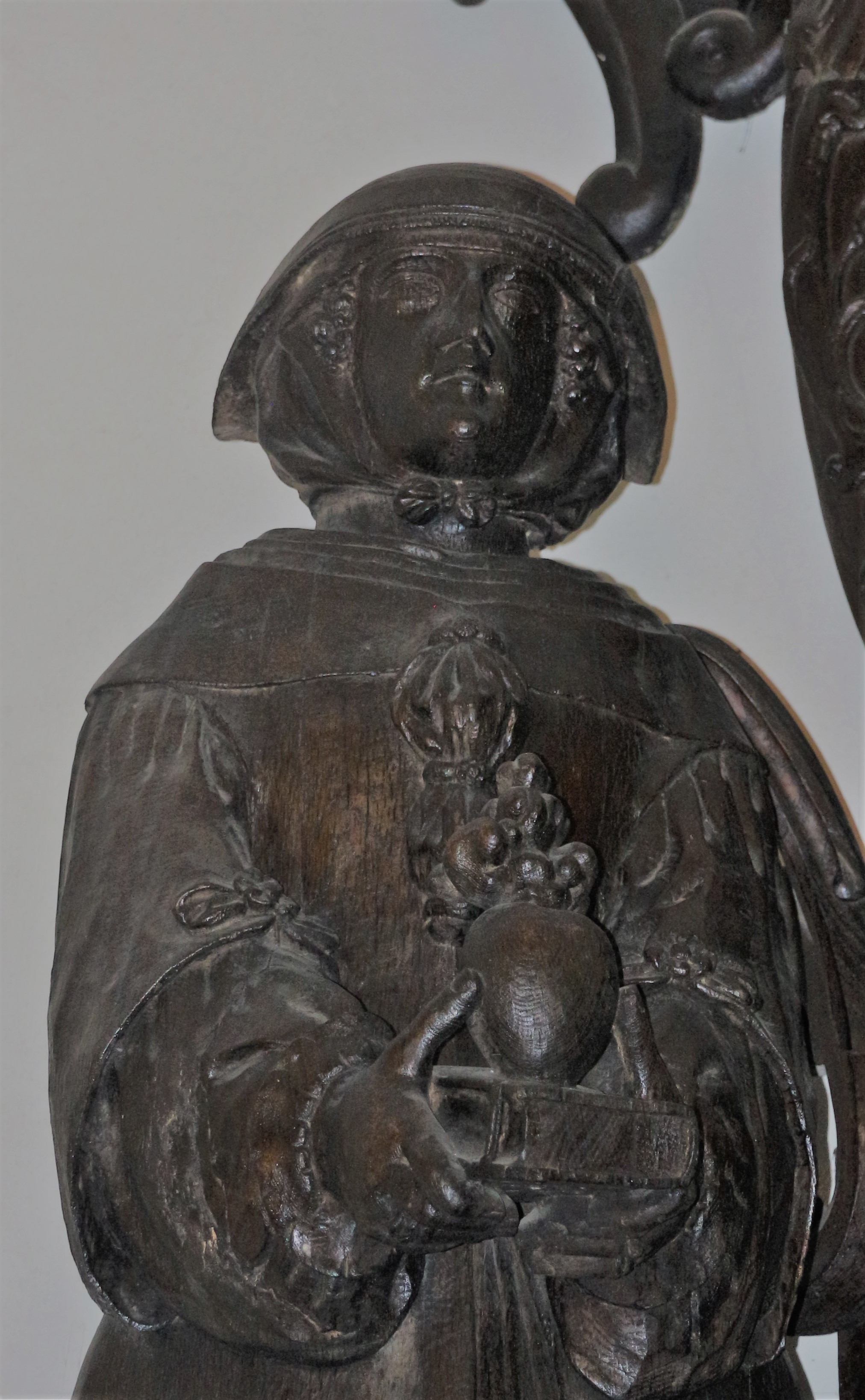 Elisabeth Beling (oder Behling) (1595-1679), die Stifterin der Dreifaltigkeitskirche in Schleswig-Friedrichstadt, auf dem Epitaph, das sie in dieser Kirche für ihren Mann Bonifacius Beling († 1630) und ihren Sohn Oswald (1625-1646) errichten ließ.